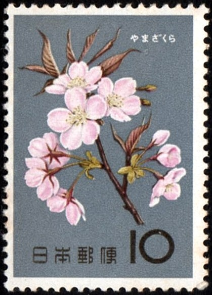 日本の切手、1961 花シリーズ、やまざくら, Japanese Postage Stamp, 1961 Flower series, Sakura #331, Scott Catalog #715, Yamazakura blossoms